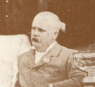 Ալֆրեդ Էդվարդս